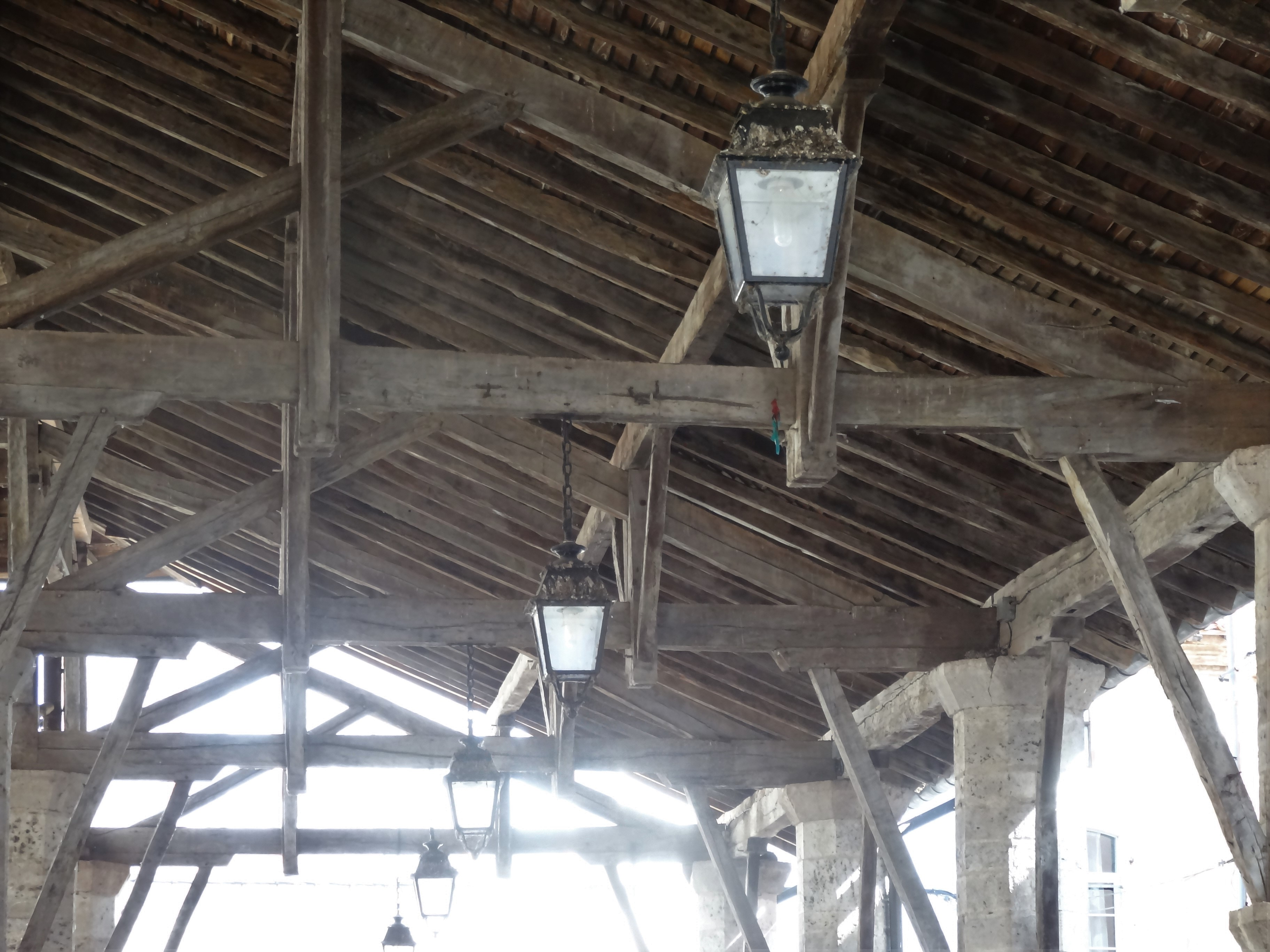 Détails de la halle de Gimont datant du 13e siècle. .